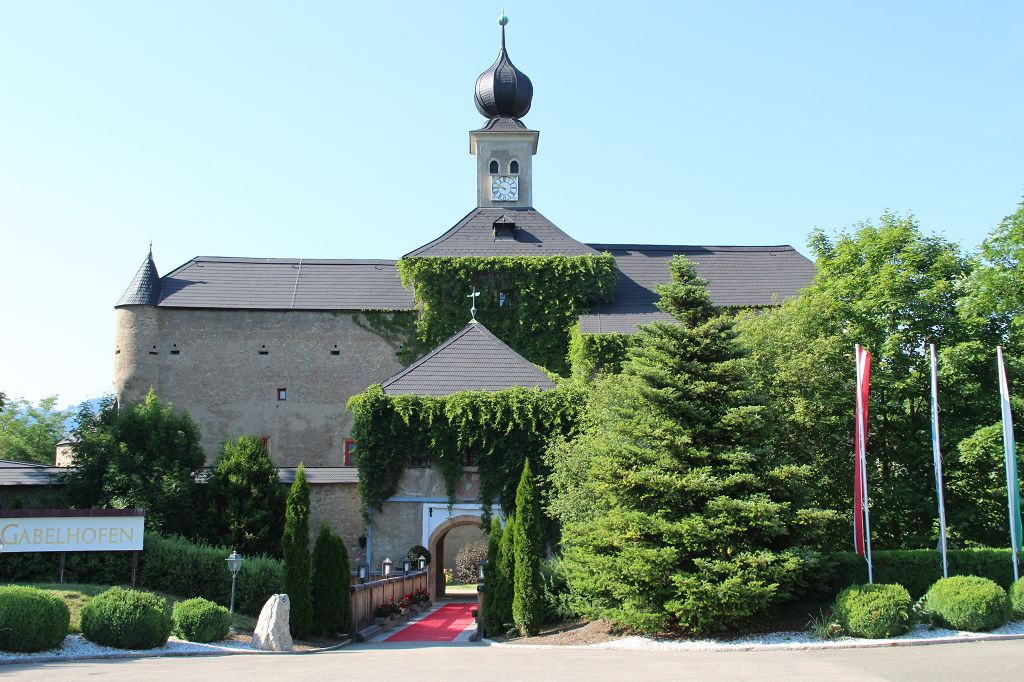 Formula 1 2019 / Schloss Gabelhofen